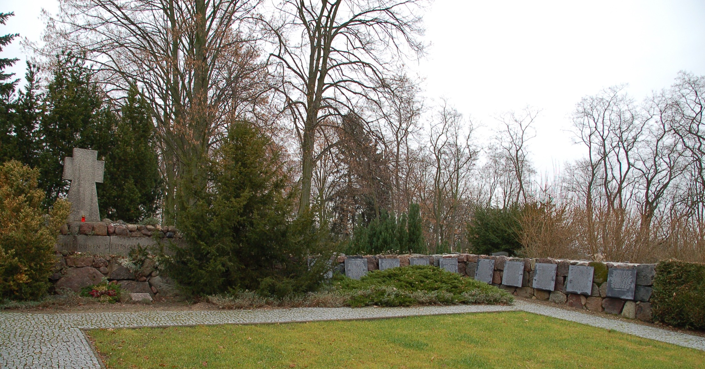 Lebus, Kriegerdenkmal für die Opfer des II. Weltkrieges